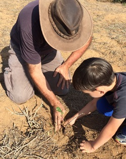 זריעת בלוטי אלון תבור כחלק מפרויקט האלונים לשיקום יער השרון